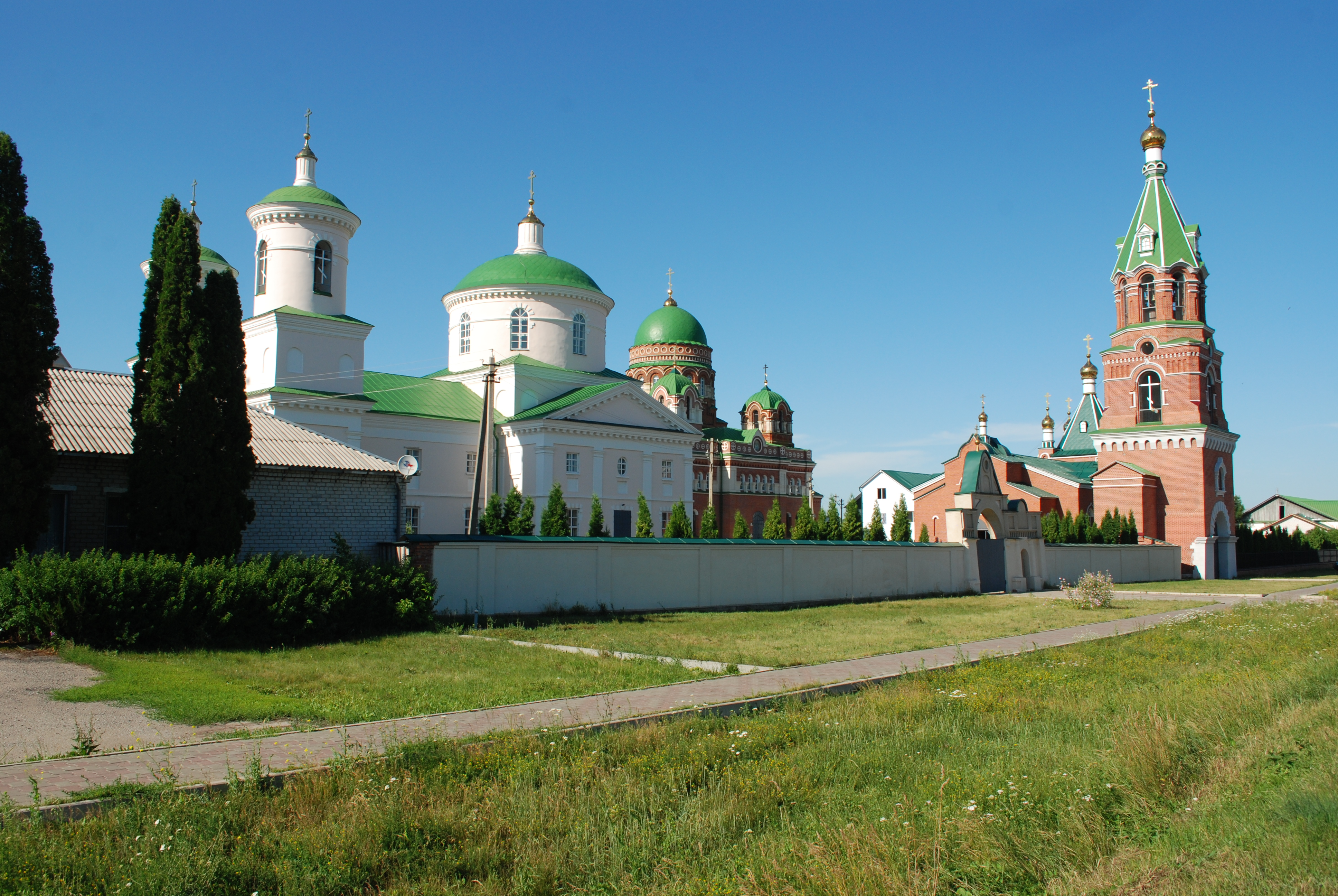 Монастырь Троекуровский Лебедянский женский (Липецкая область, Лебедянь, село Троекурово)